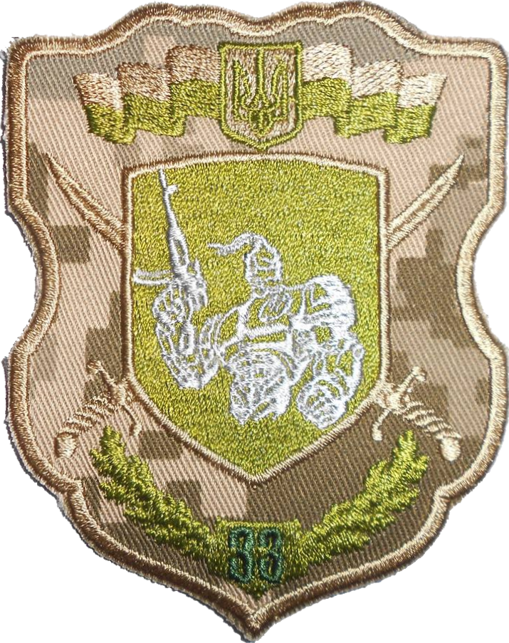 Нарукавний знак, 33 окрема механізована бригада